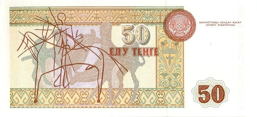 50 тенге 1993 года